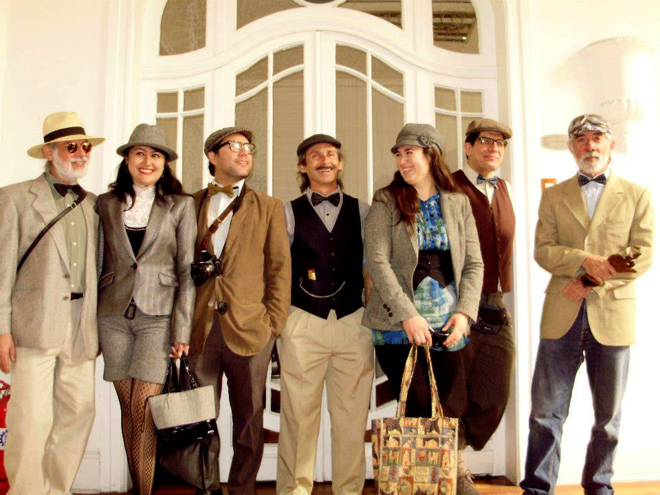 Grupo en Colegio de Arquitectos